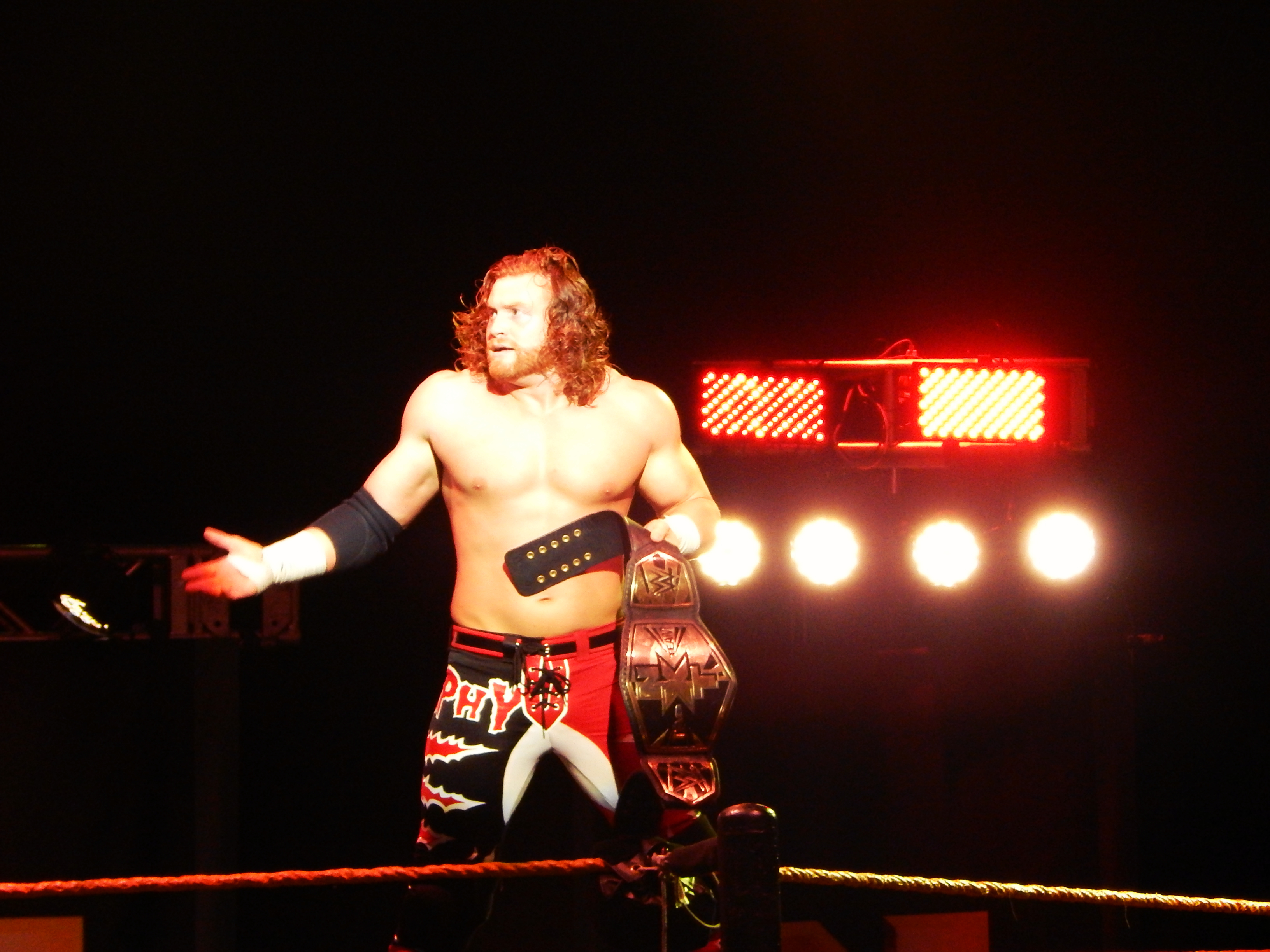 Murphy avec la ceinture de champion par équipe de la NXT.